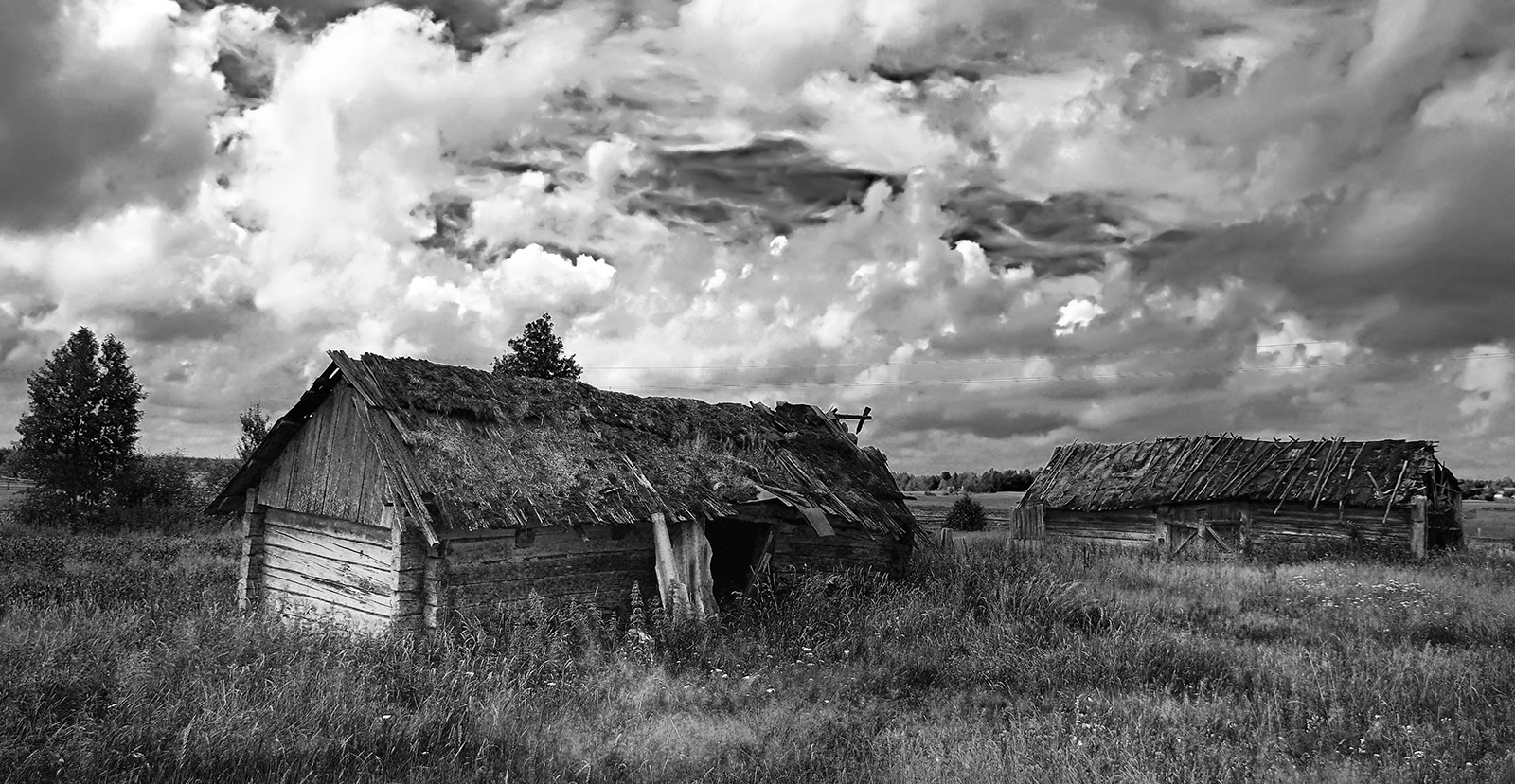 в`їзд в Старе Село (Рівненська область)